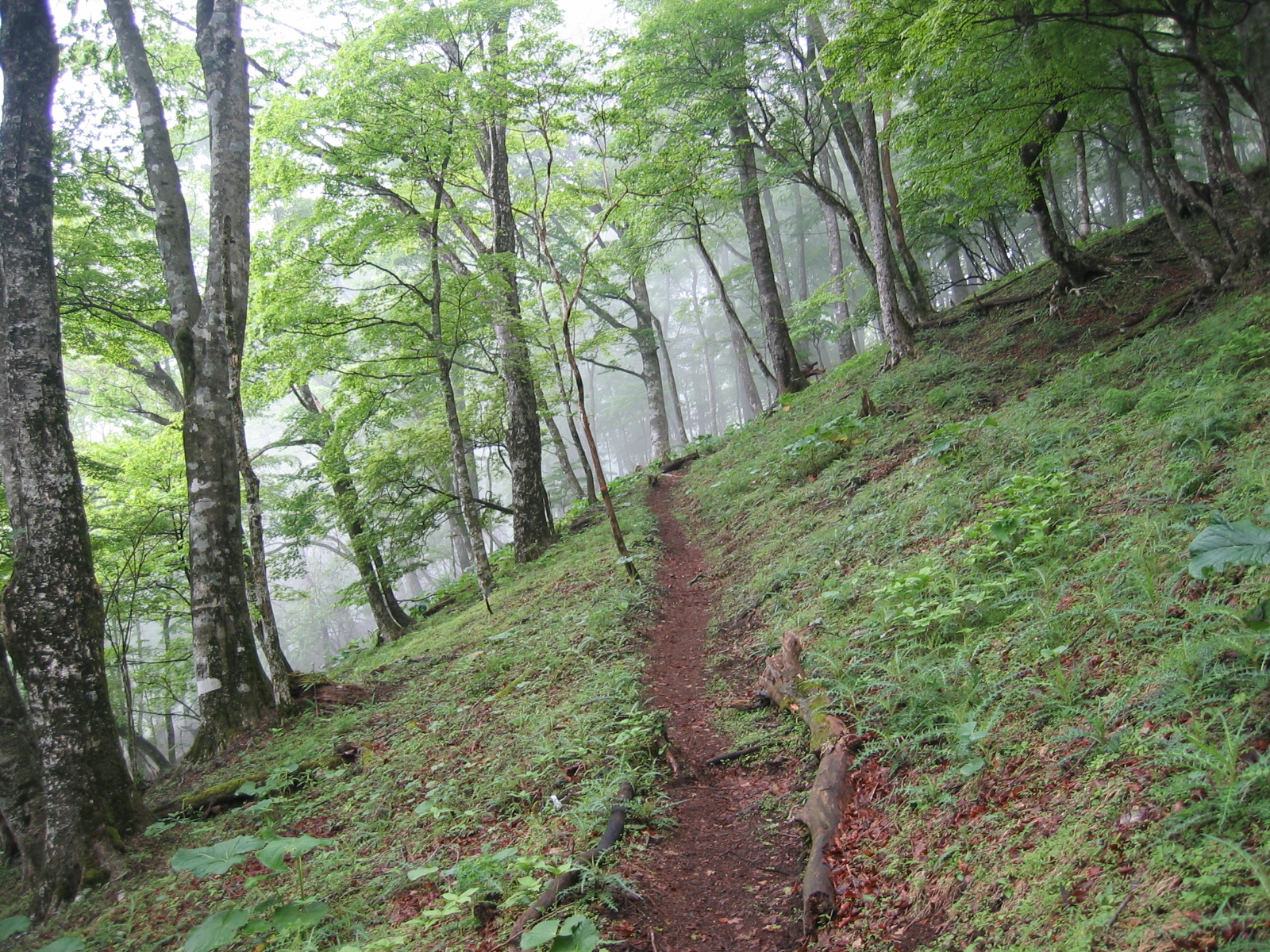 丹沢山地、堂平付近の登山道